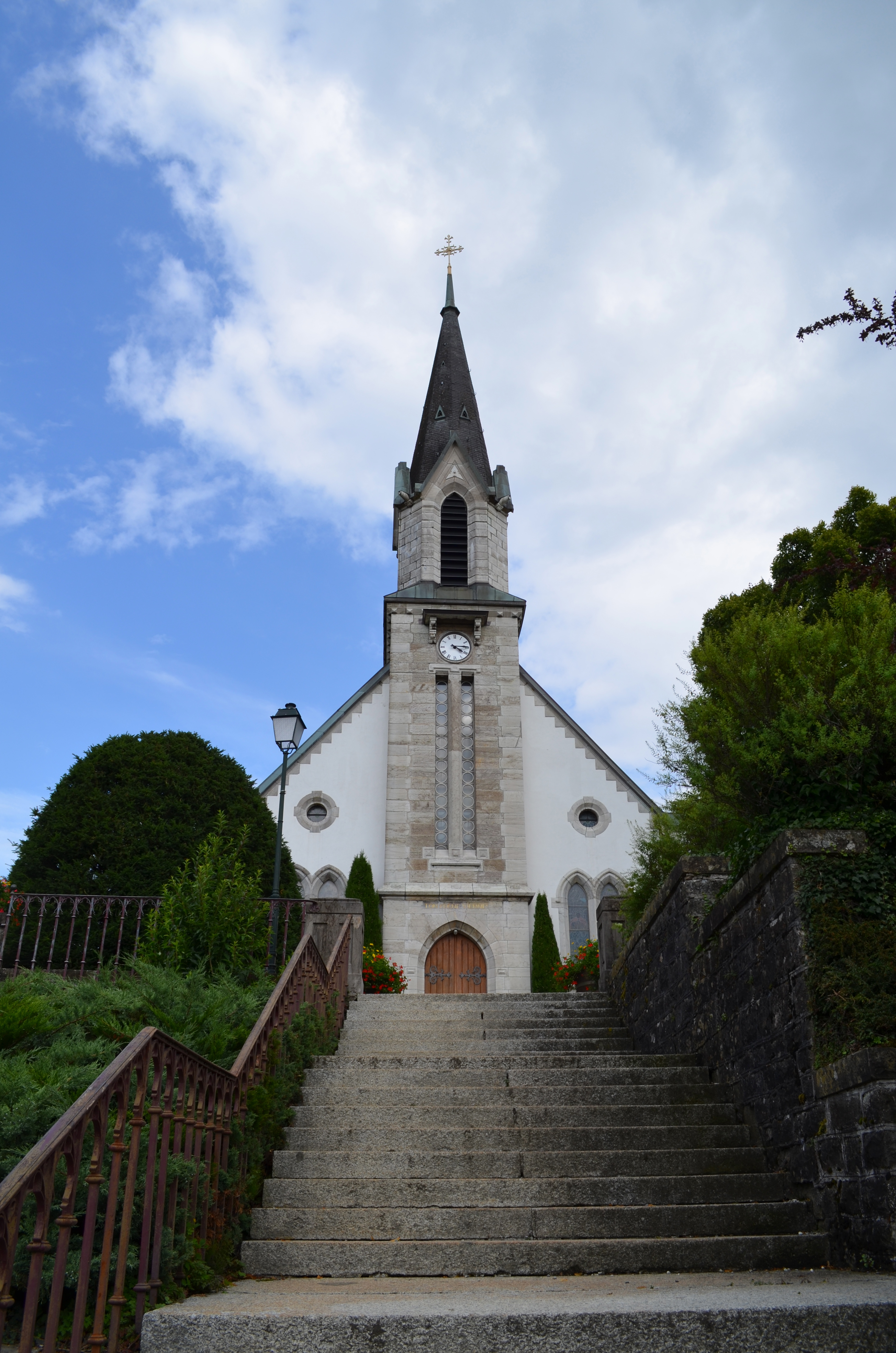 Église de Chexbres (Vaud-Suisse)